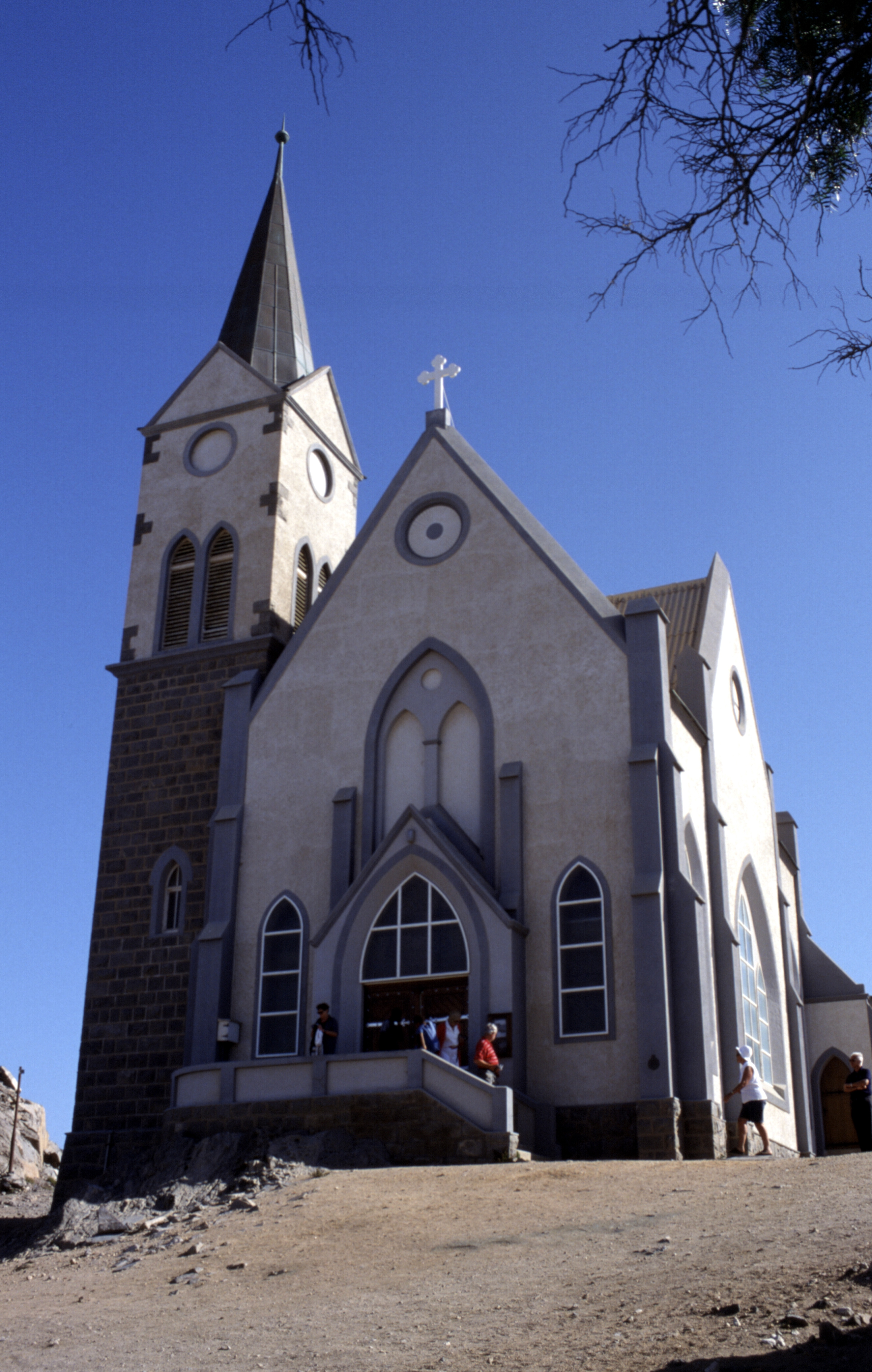 Die Felsenkirche in Lüderitz im Oktober 2002.